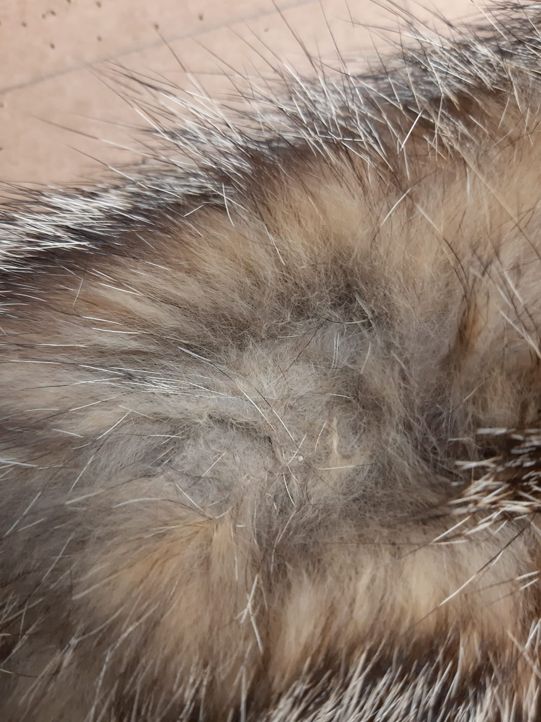 Verfilztes Grisfuchsfell im Saum eines Grisfuchsmantels.